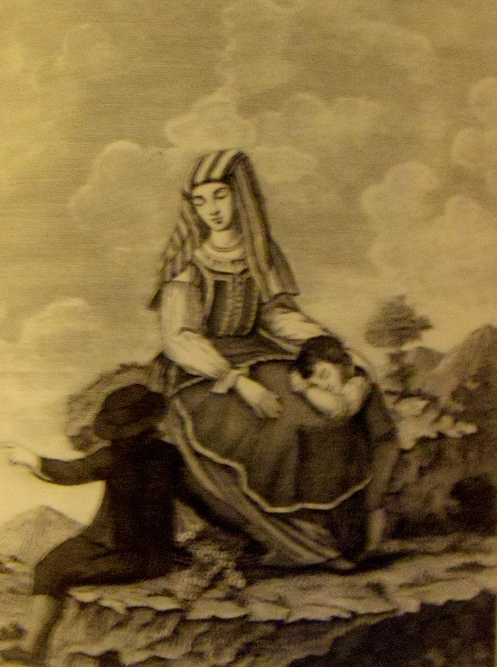 Incisione raffigurante il costume tipico della donna di Cerreto Sannita (Italia).